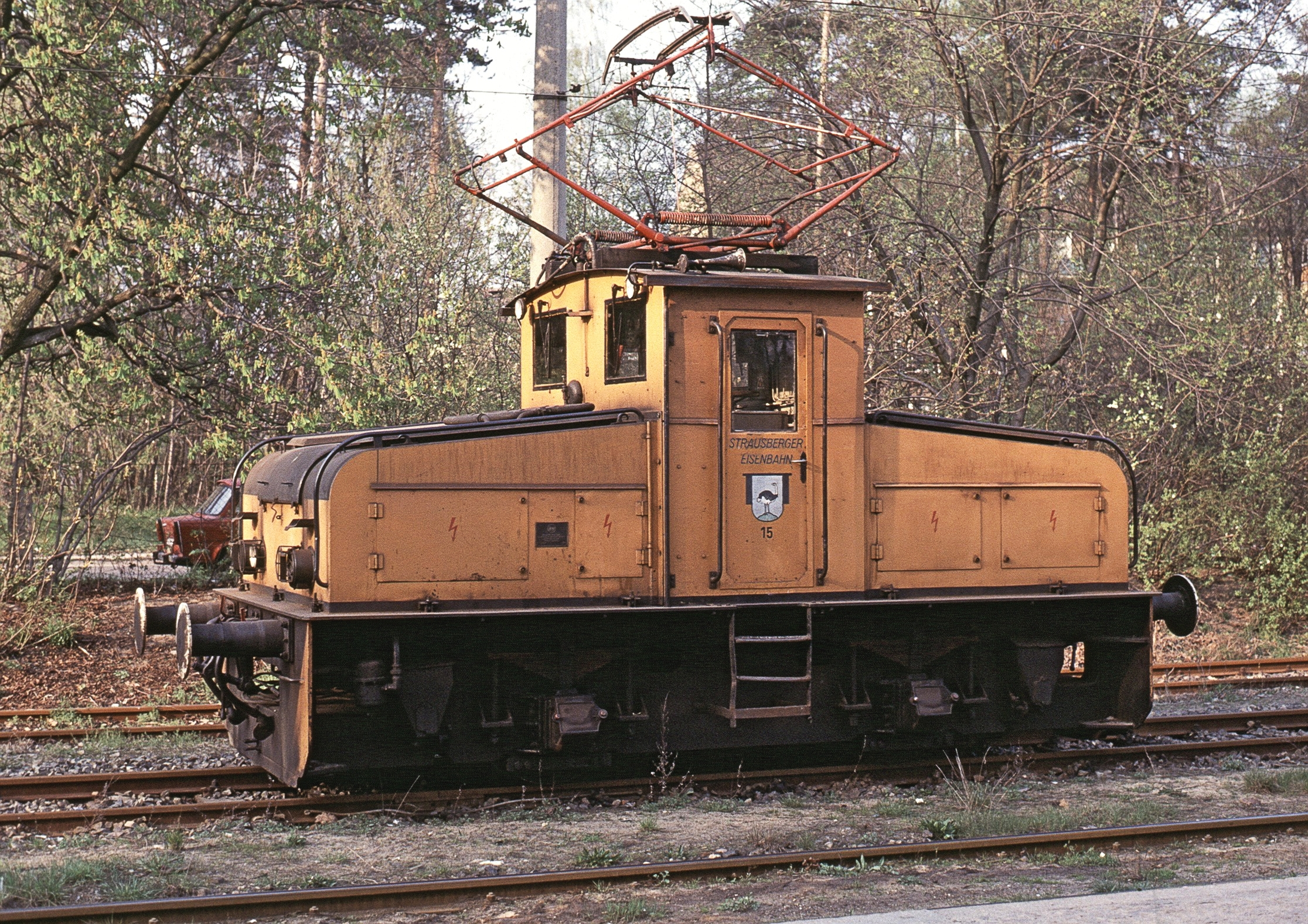 Lok 15 der Strausberger Eisenbahn